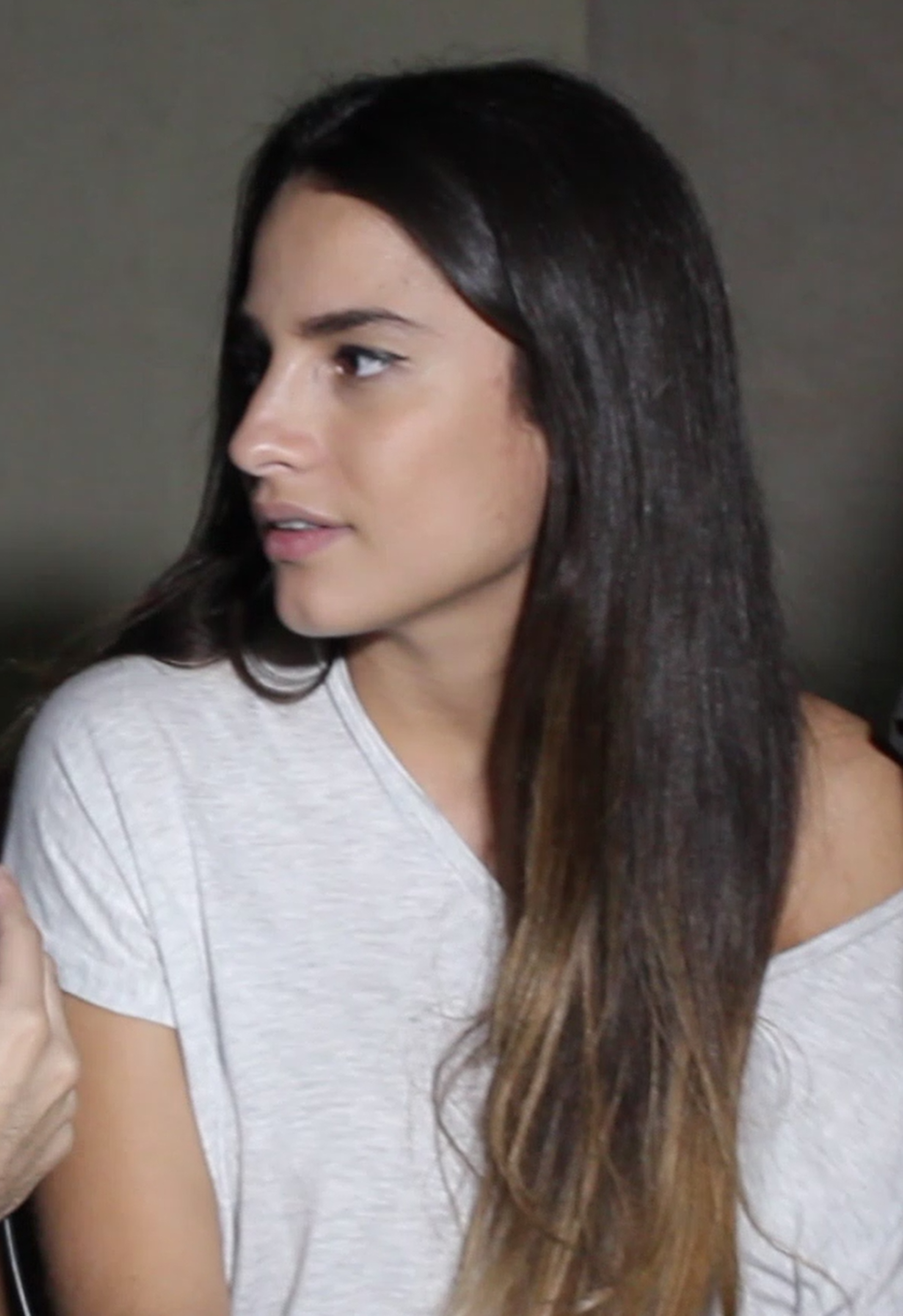 Joselyn Gallardo en 2015.